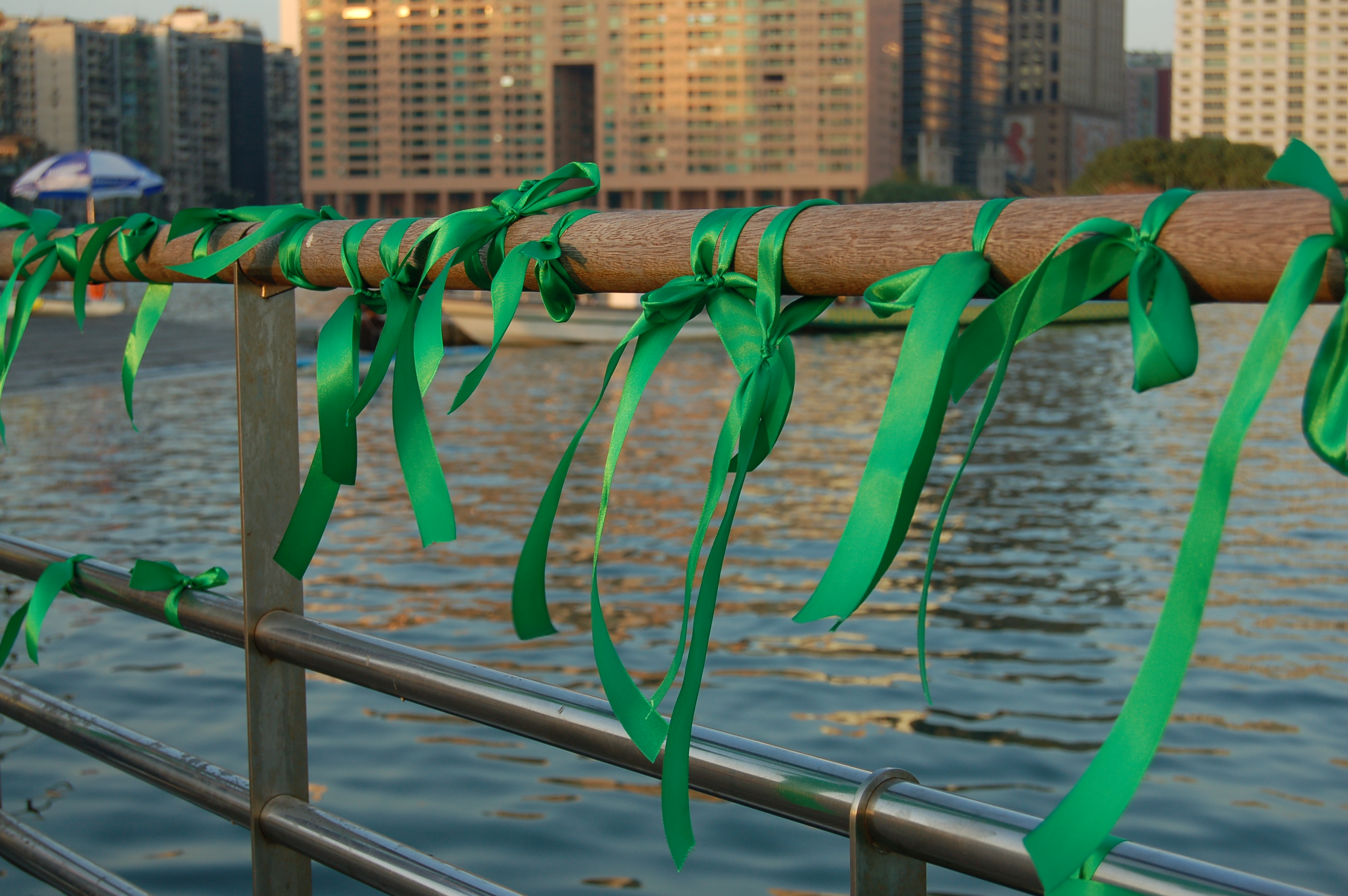 Fitas verde no Centro Náutico da Praia Grande em 20 de Dezembro de 2008